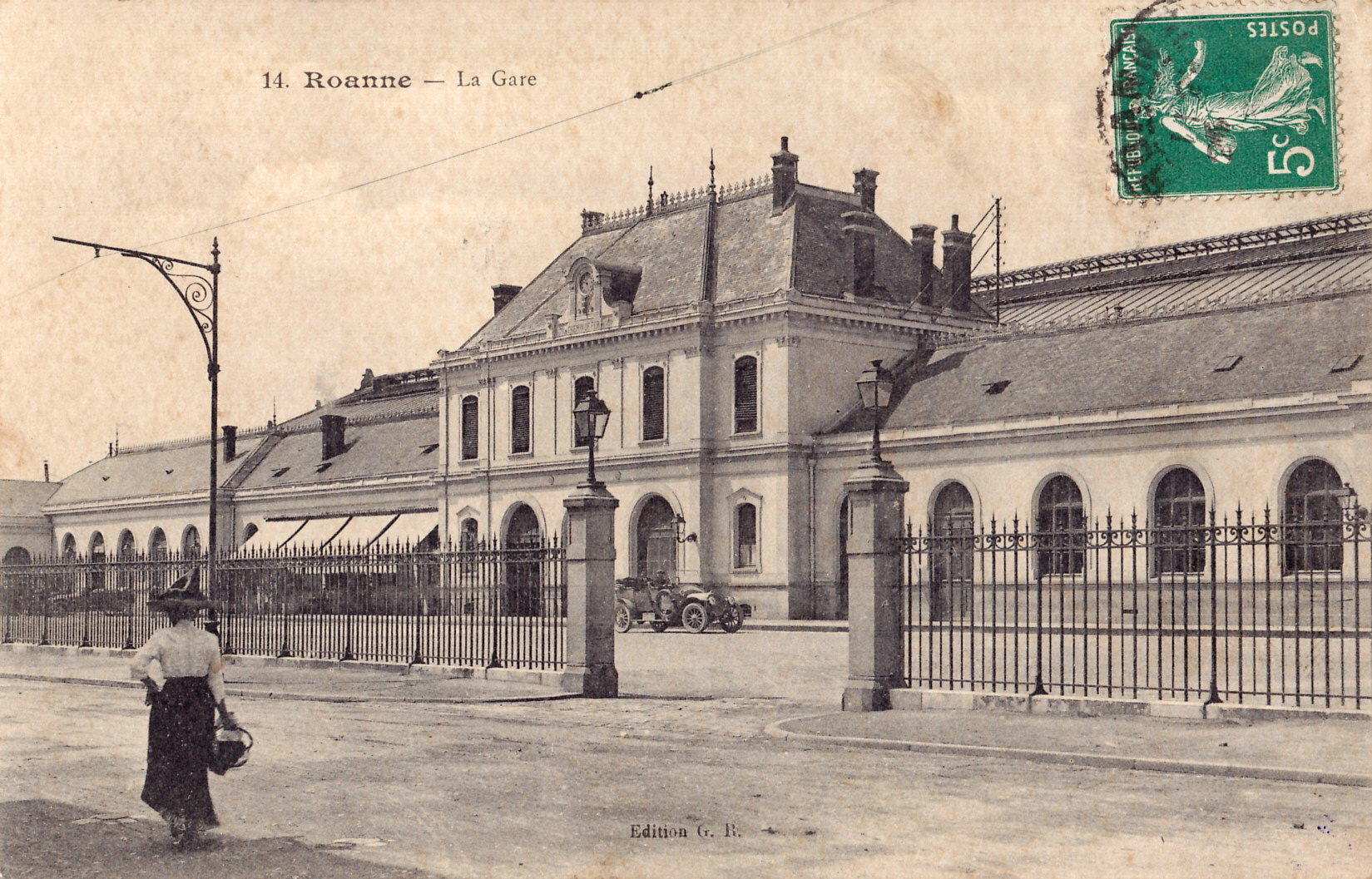 Carte postale ancienne éditée par GR, n°14 : ROANNE - La Gare